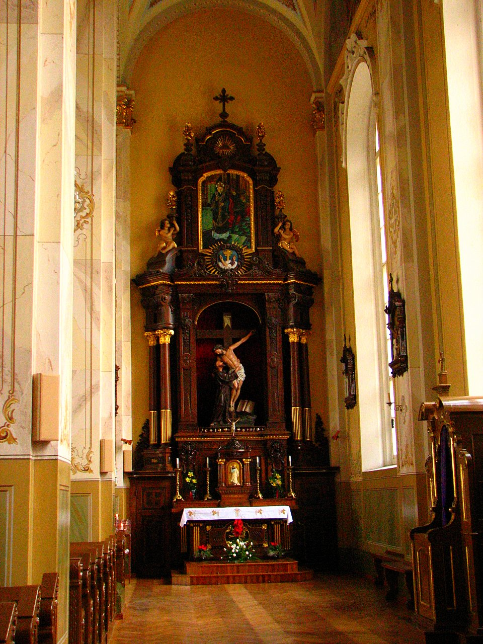 Panevezio Kristaus Karaliaus katedra. Soninis altorius.